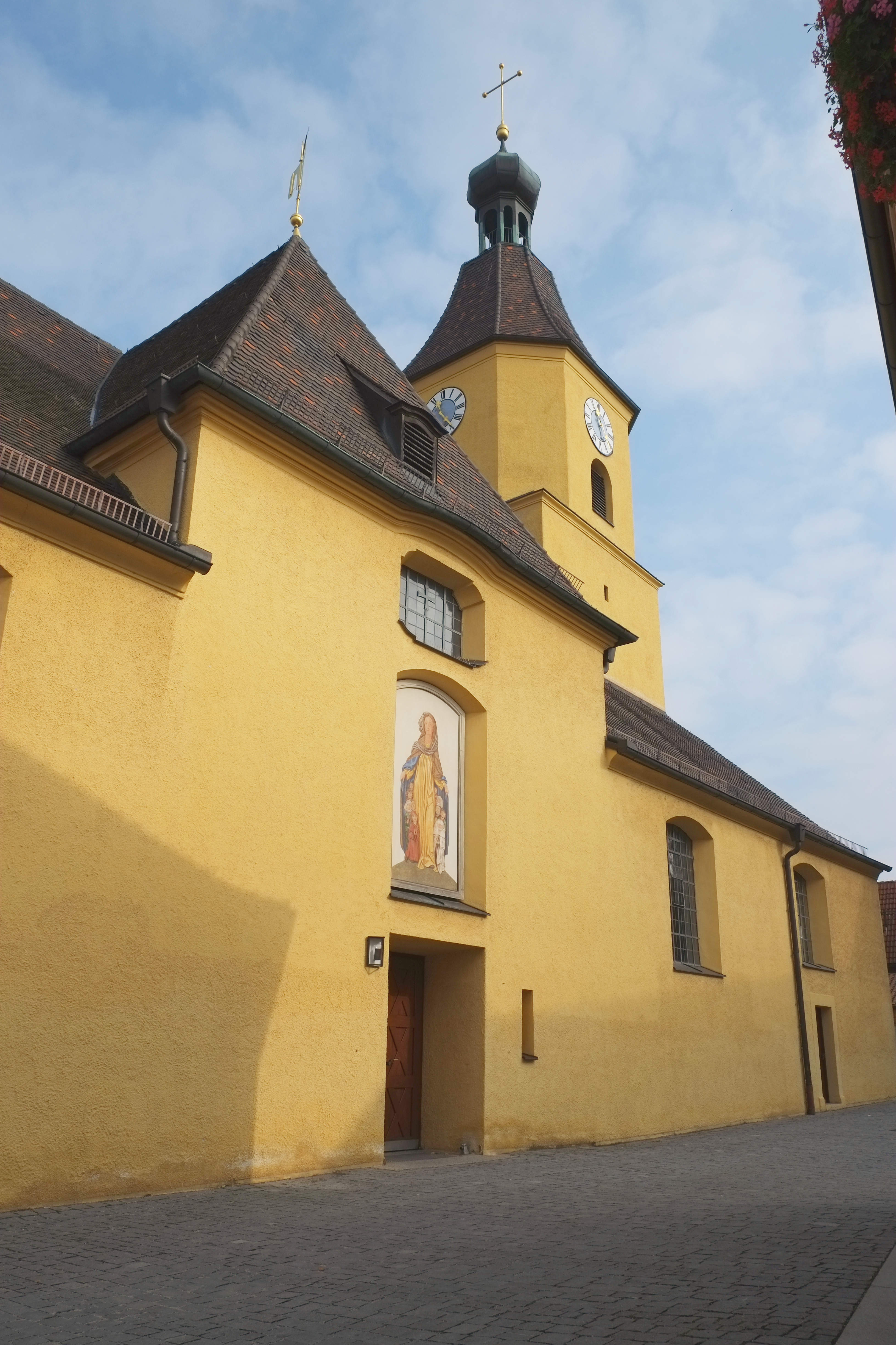 Kirche St. Nikolaus in Pleinfeld im Landkreis Weißenburg-Gunzenhausen (Bayern/Deutschland)